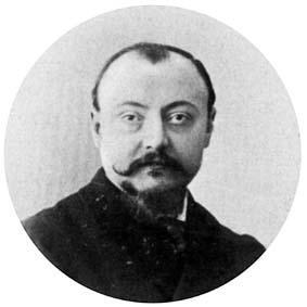 Photographie de Gustave Geley